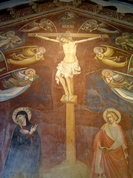 Crusifixion_jacopo_di_mino_oratorio_di_san_bartolomeo